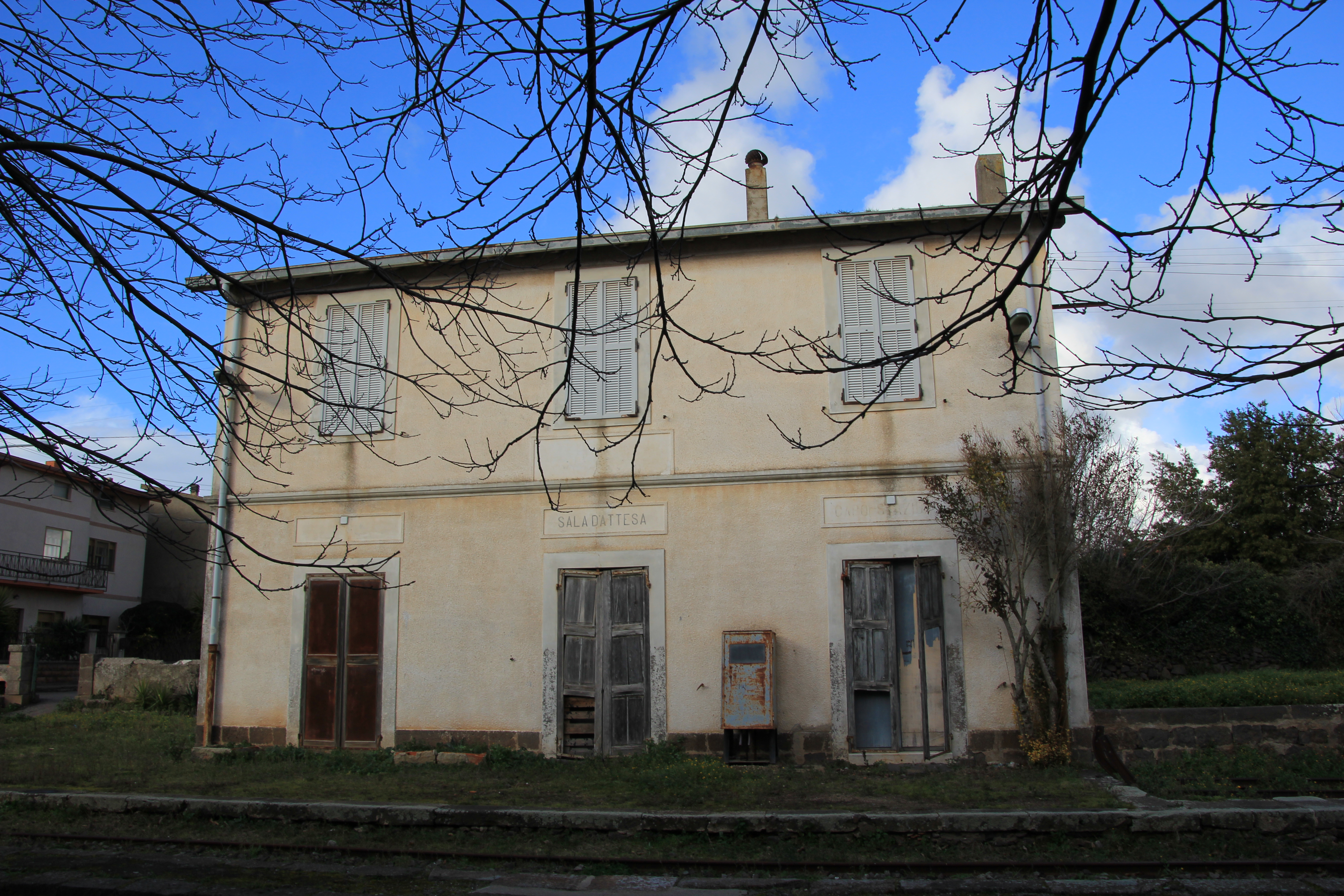 Sindia, stazione ferroviaria